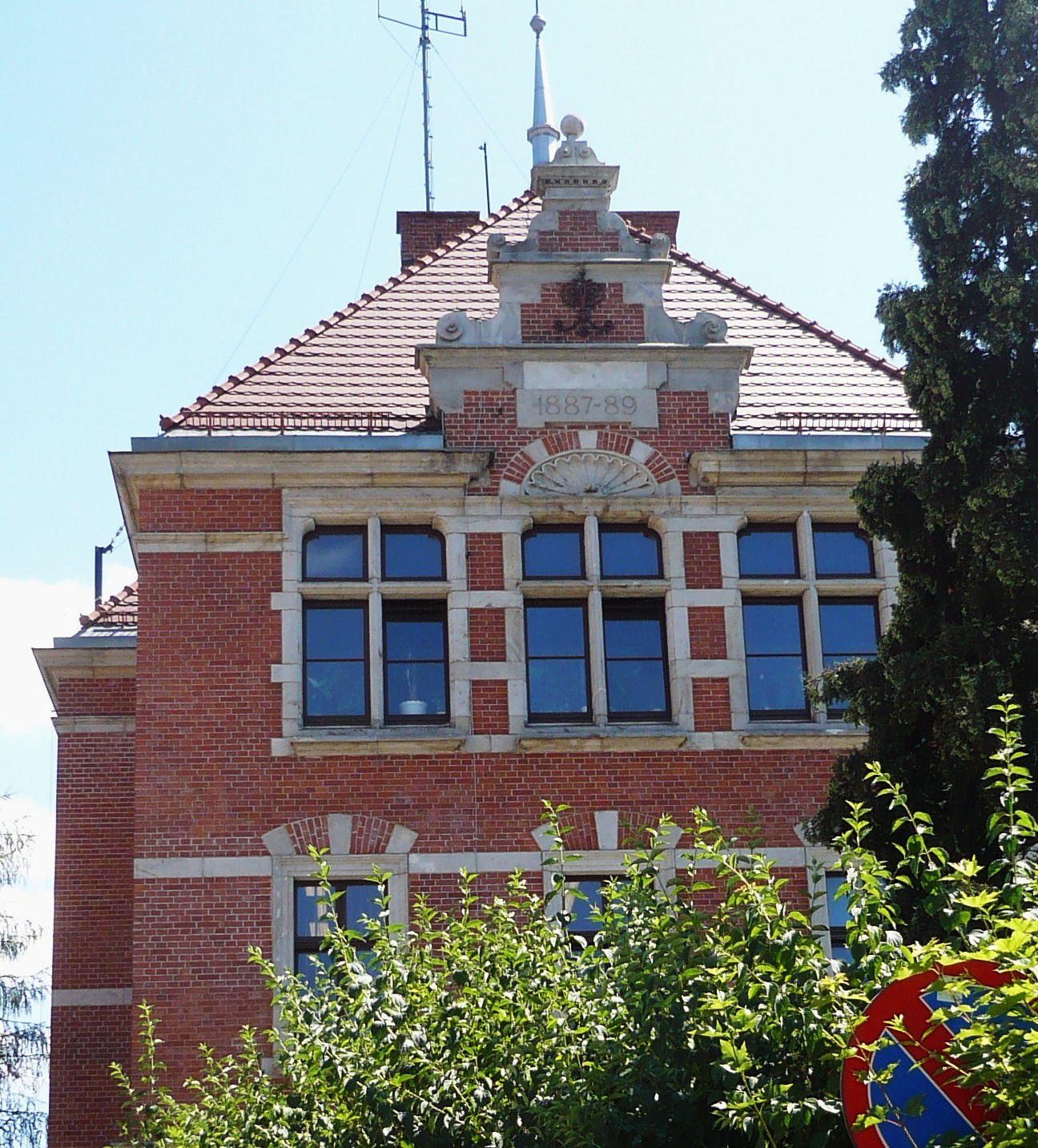 Nowa Ruda, ul. Bohaterów Getta 29 - pierwotnie sąd, obecnie komisariat policji, 1887-1889